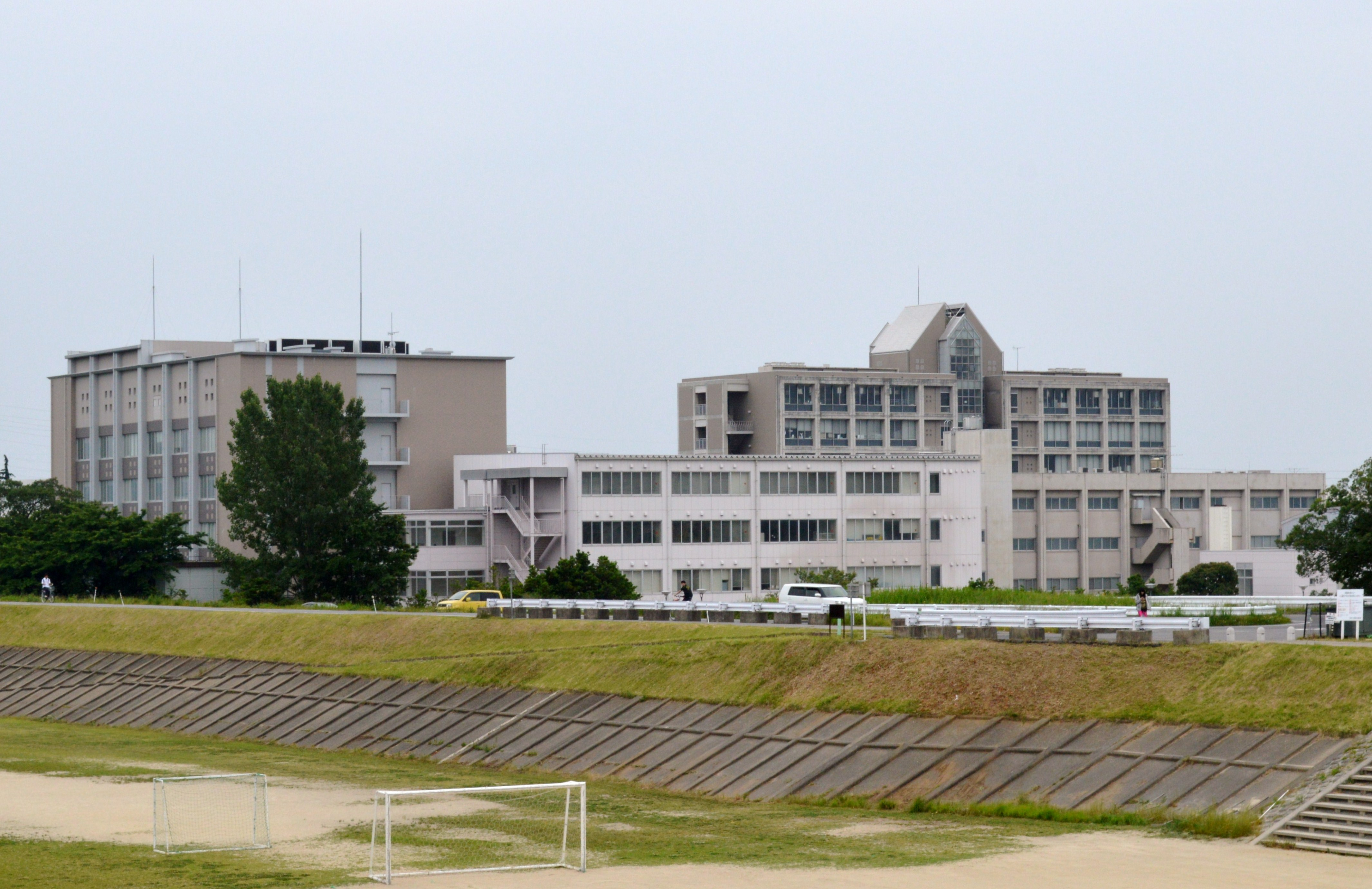 愛知学泉大学 岡崎キャンパス